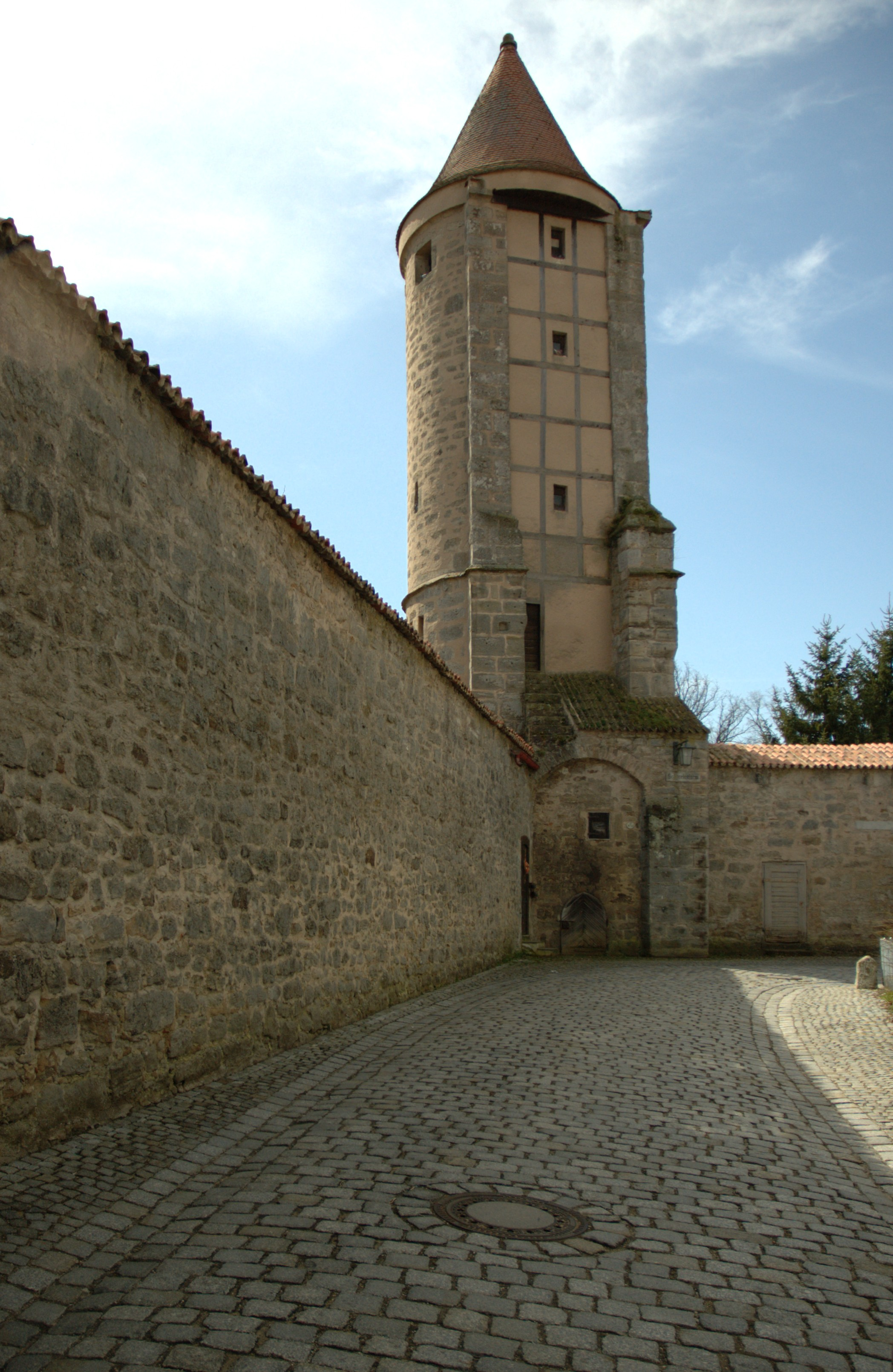 Dinkelsbühl, Salvartenturm